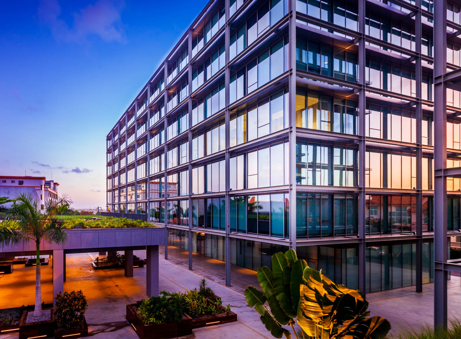 Cidade Financeira | Luanda | Angola